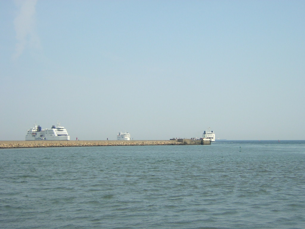 Three ferries at the outside of the Puttgarden harbour. (Photo from Benutzer:Lecartia taken in August 2005) Drei Fähren außerhalb des Puttgardener Hafens auf Fehmarn. (Foto von mir Benutzer:Lecartia im August 2005 aufgenommen)